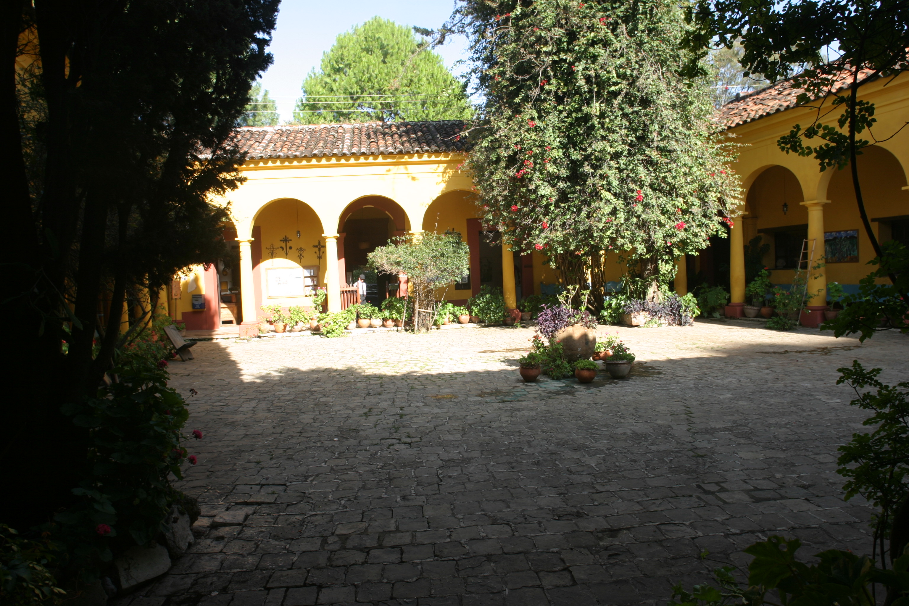 Patio Principal Museo Na Bolom